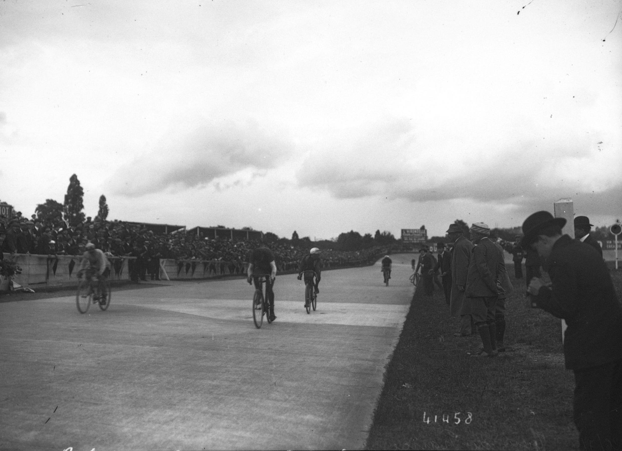 L'arrivée du Tour de France 1914 au Parc des Princes